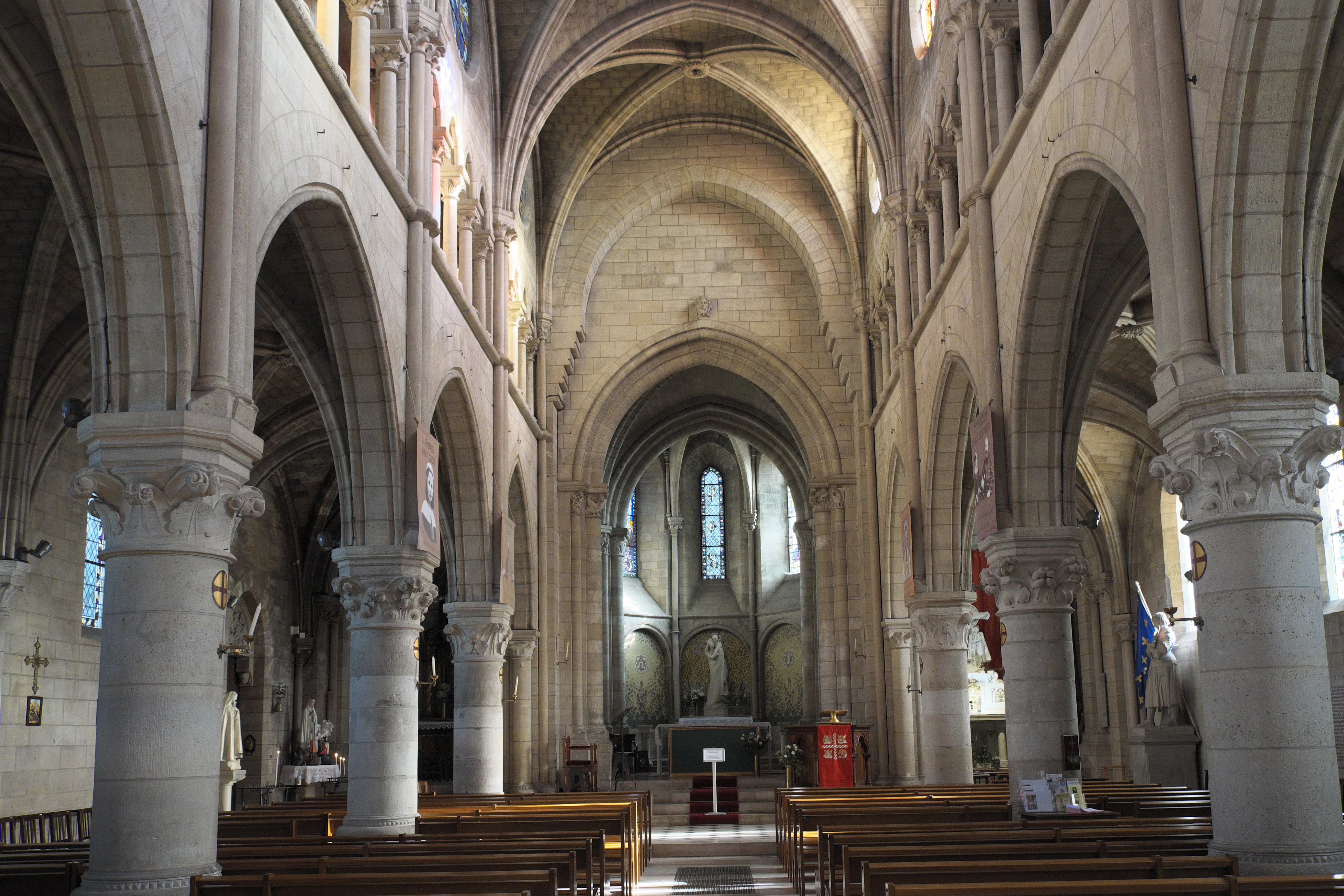 Katholische Pfarrkirche Notre-Dame in Bougival im Département Yvelines (Île-de-France/Frankreich), Innenraum, Blick zum Chor